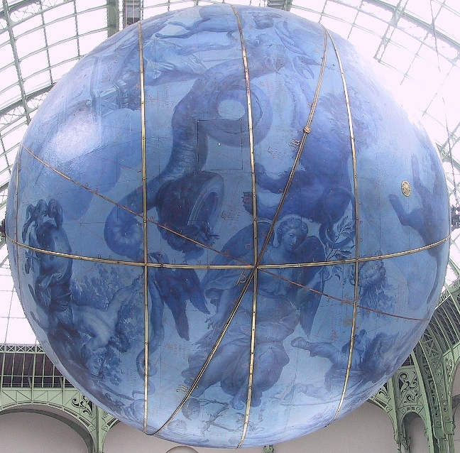 Globe céleste de Coronelli Lieu:Grand Palais - Paris